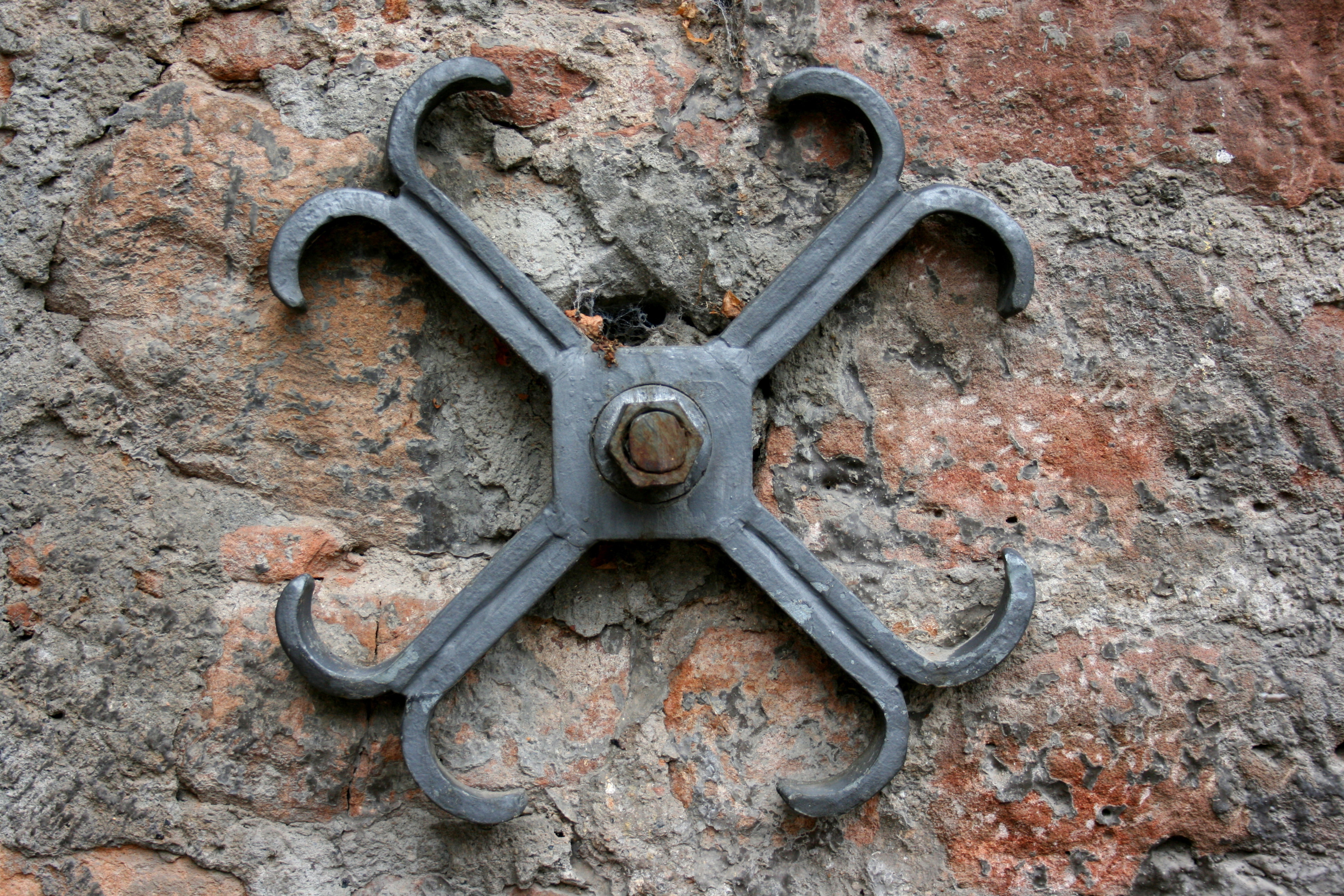 Ritterstraße in Marburg